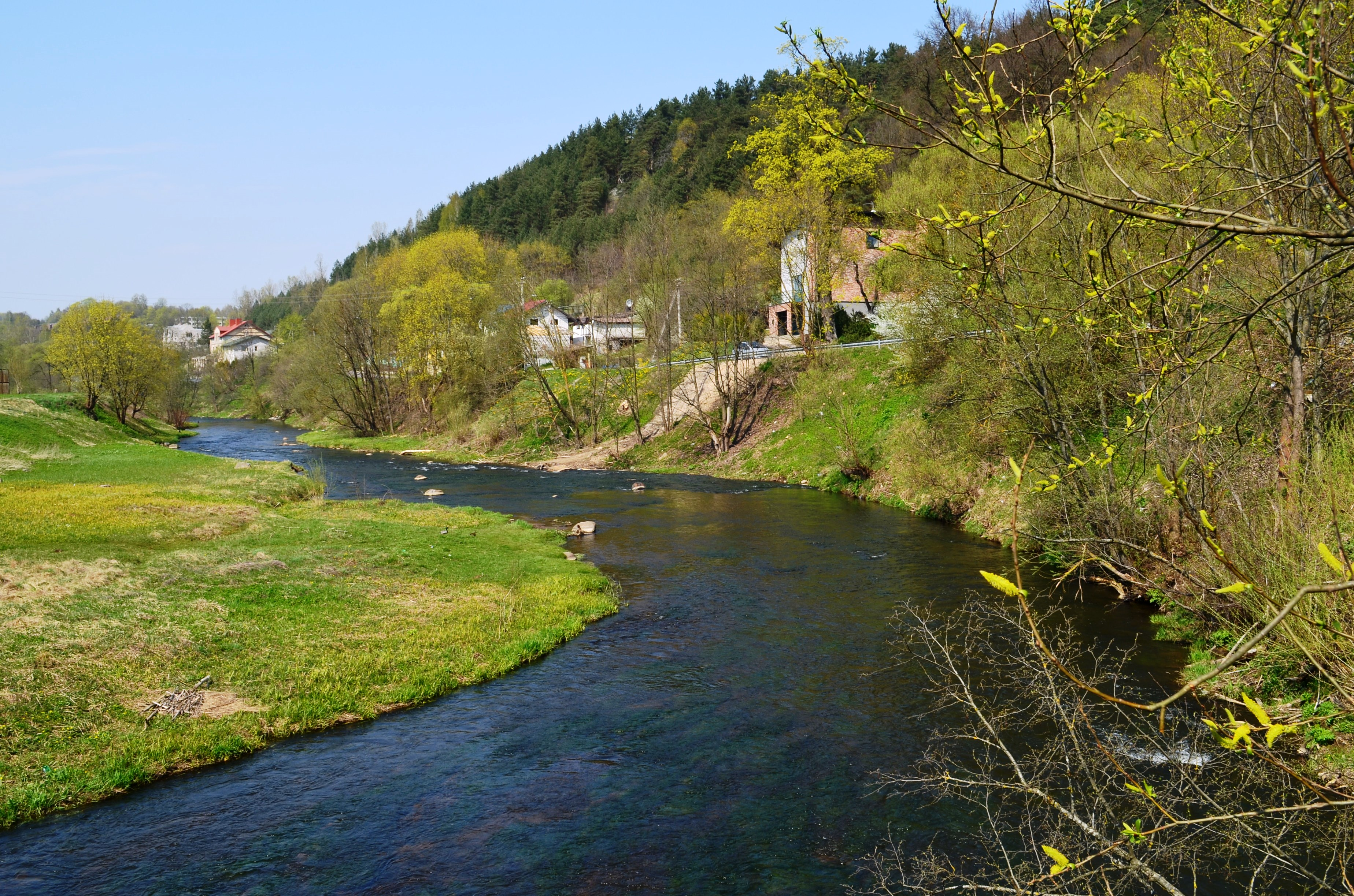 Vilnelė tarp Belmonto ir Markučių, Vilnius